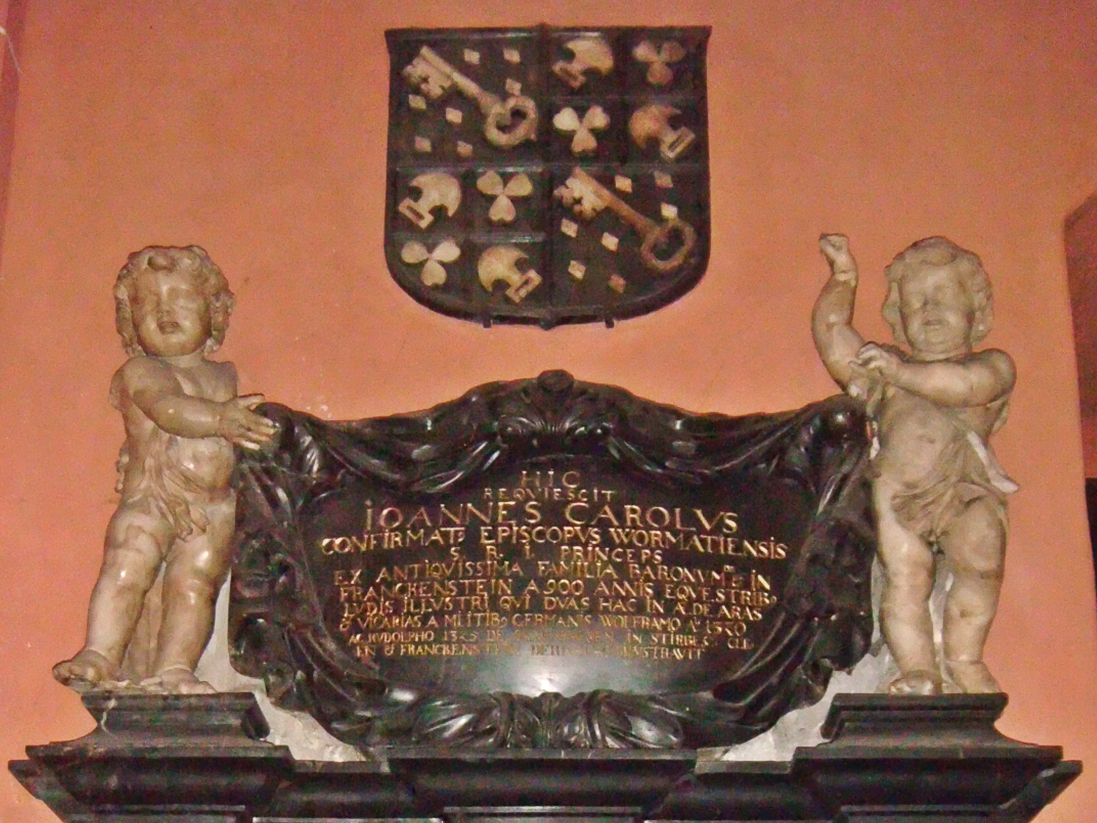 Grabinschrift und Wappen des Wormser Bischofs Johann Karl von und zu Franckenstein (1610-1691), Dom zu Frankfurt